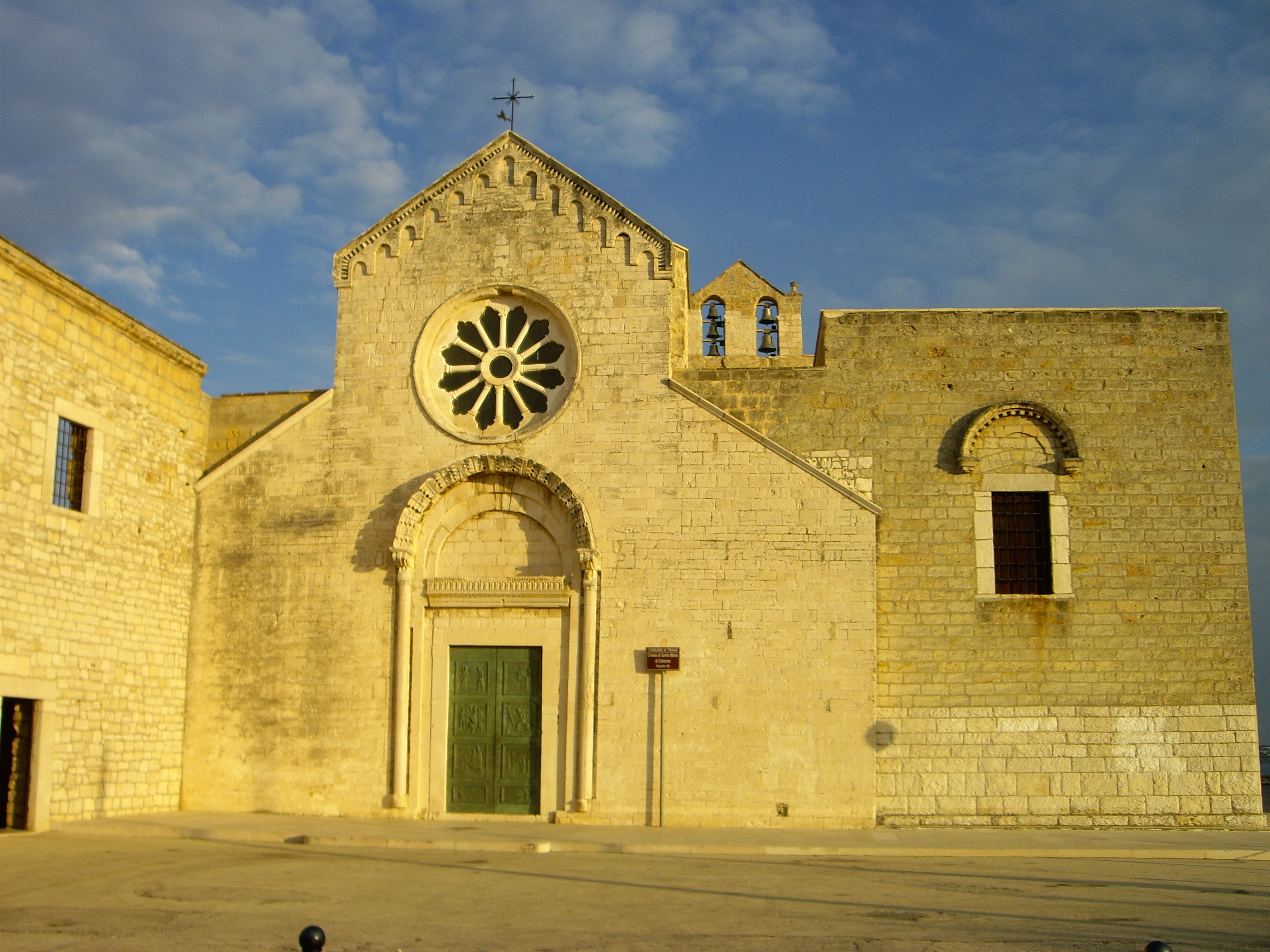 Chiesa di Santa Maria di Colonna, Trani